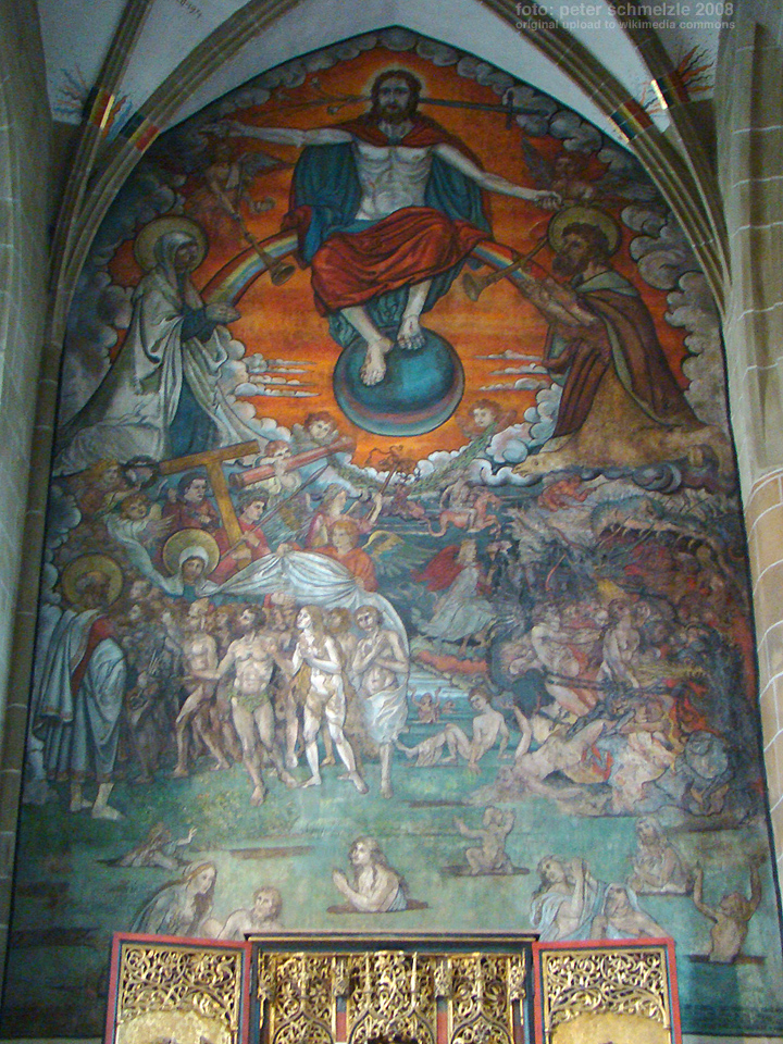 Das jüngste Gericht, Wandmalerei an der östlichen Giebelwand des nördlichen Seitenschiffs von Heinrich Vogtherr dem Älteren, um 1523, Stadtkirche Bad Wimpfen Die Arbeit wurde um 1870 der Zeit entsprechend stark restauriert und damit ihrer Ursprünglichkeit beraubt. Sie ist das einzig erhaltene Fresko Vogtherrs.